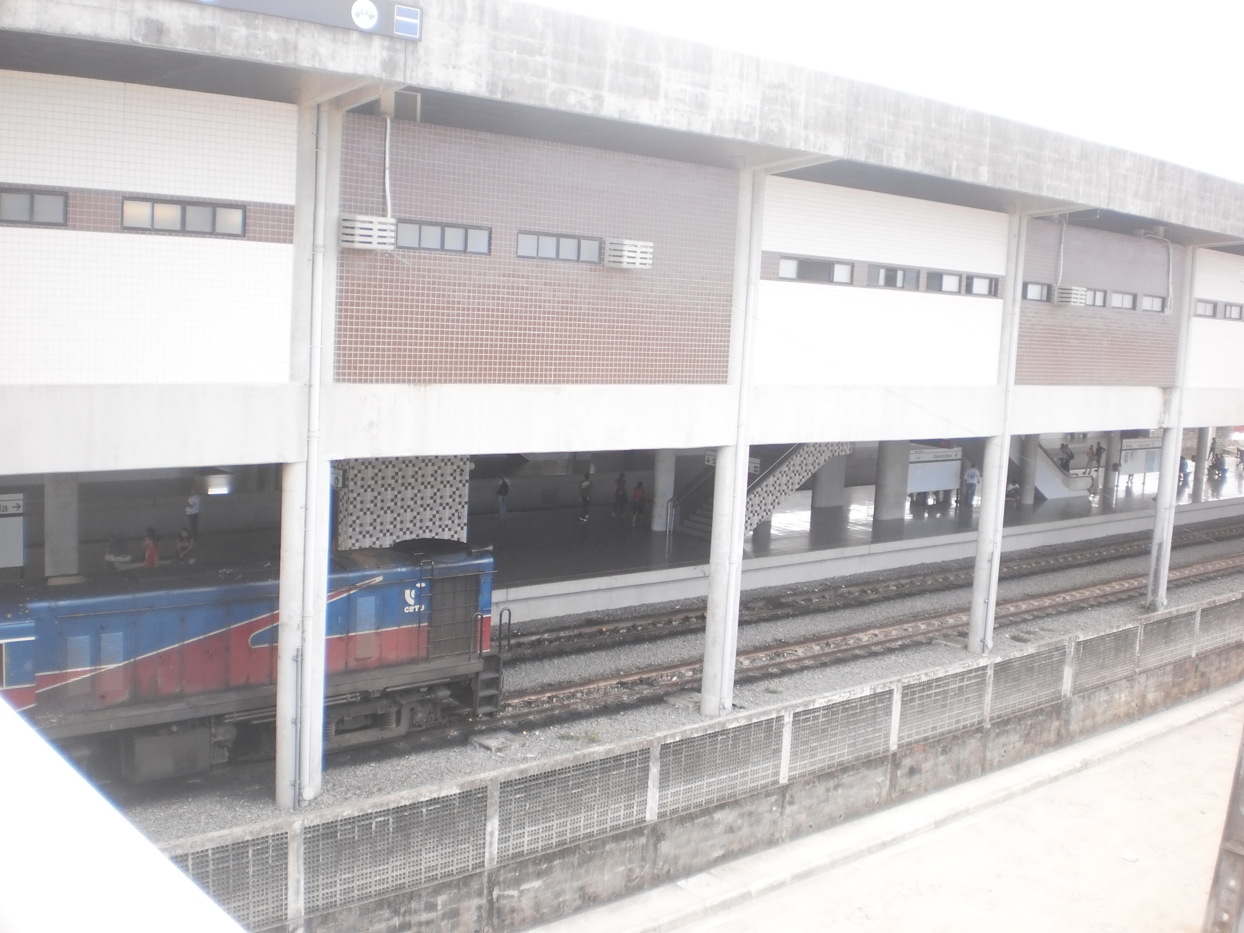 estação do metro de Cajueiro Seco